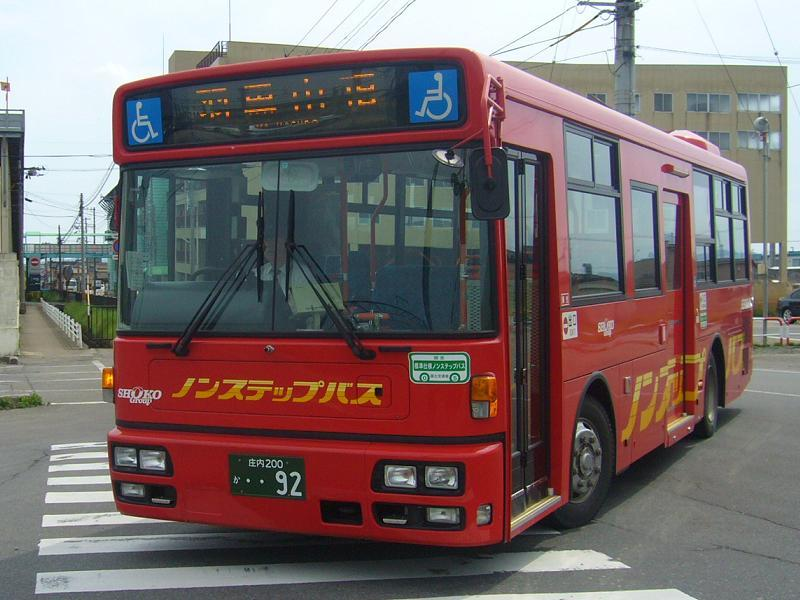 登録番号 庄内200か92 庄内交通所属 2007年5月12日 鶴岡エスモール附近にて撮影 撮影者 Tokatsu kokubu